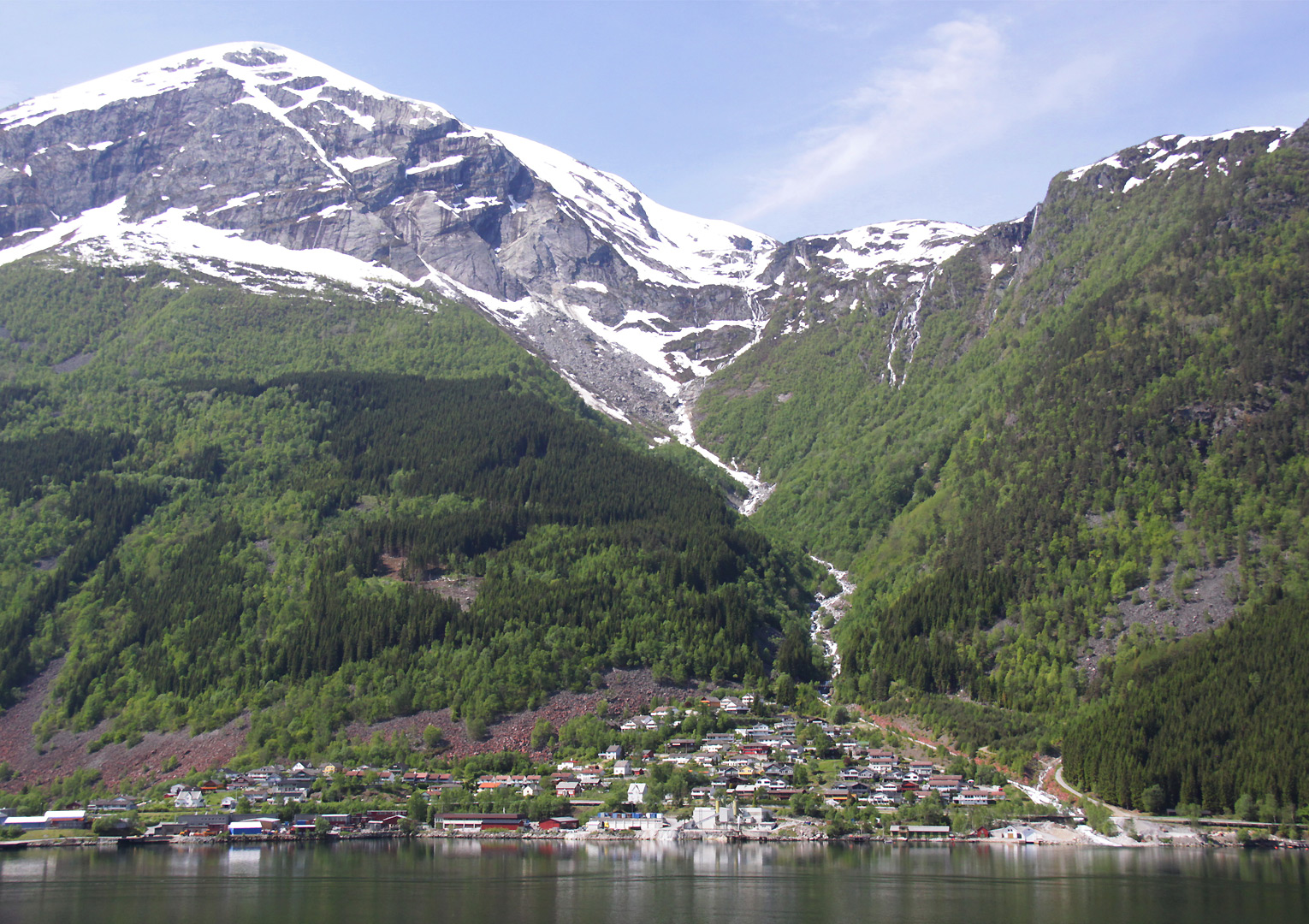 Eitrheim, Odda, Hordaland, Norge.